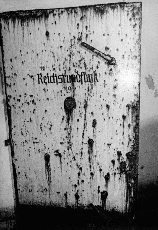 Berlin, Neue Reichskanzlei, Bunker, Bunkertür ADN-Hubert Link 9.8.90 Berlin: Bunker geschlossen- Den vorerst letzten Blick in den Bunker der Neuen Reichskanzlei unter dem Potsdamer Platz gestattete die Ostberliner Magistratsverwaltung für Inneres Journalisten. Nachdem ein Eingang zum Bunker durch Tiefbauarbeiter für notwendige Bausicherungsmaßnahmen freigebaggert wurde, soll er jetzt mit Betonplatten verschlossen werden. Der Reichskanzleibunker, nicht zu verwechseln mit dem sogenannten Führerbunker, liegt direkt unter den Arbeitsräumen der Kanzlei, die 1945 von sowjetischen Soldaten gesprengt wurde. Hinter dieser Tür arbeitete der ehemalige Reichsrundfunk.